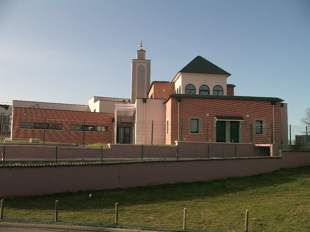 Mosquée d'Hérouville-Saint-Clair dans le Calvados (France)